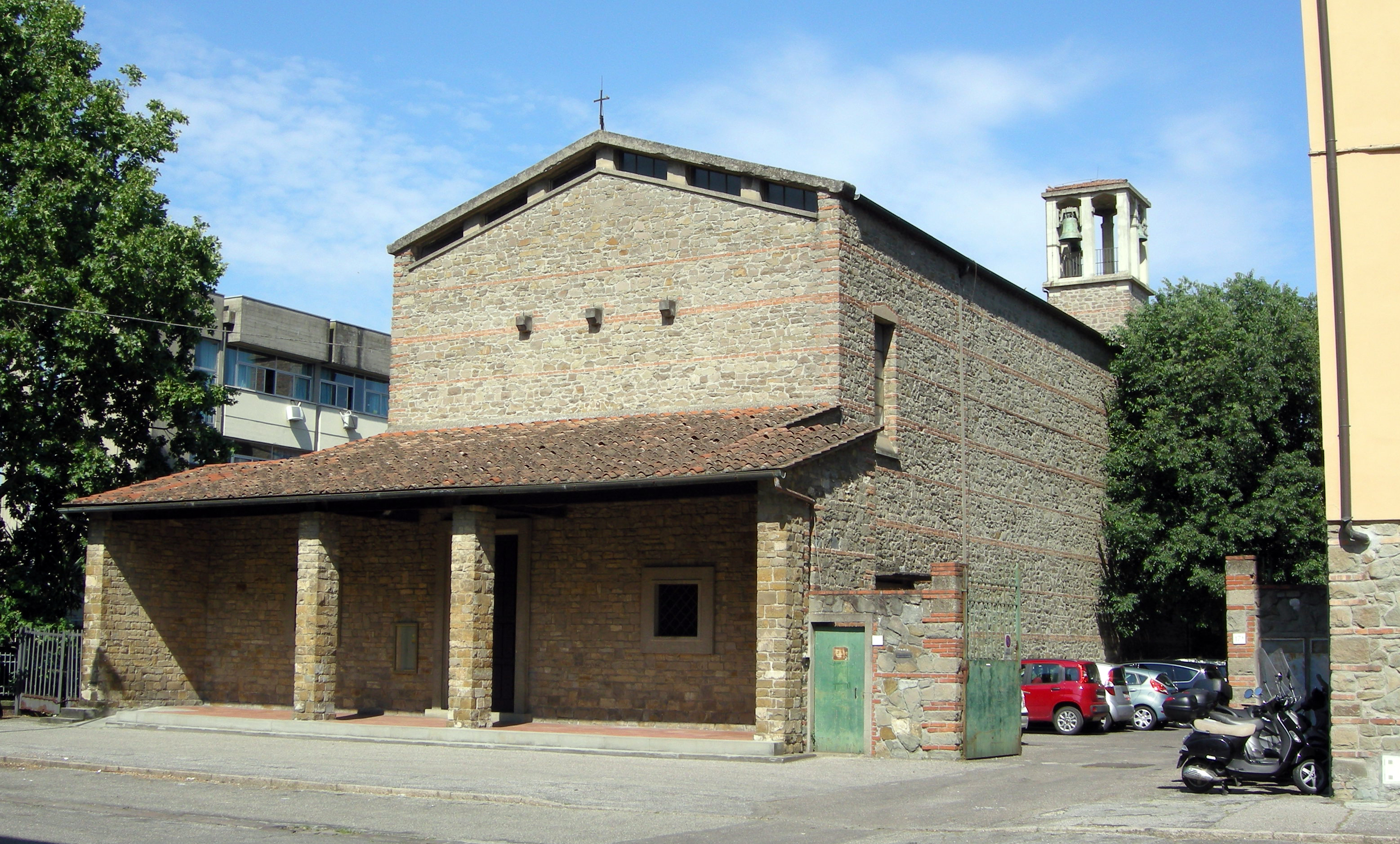 Firenze, miscellanea